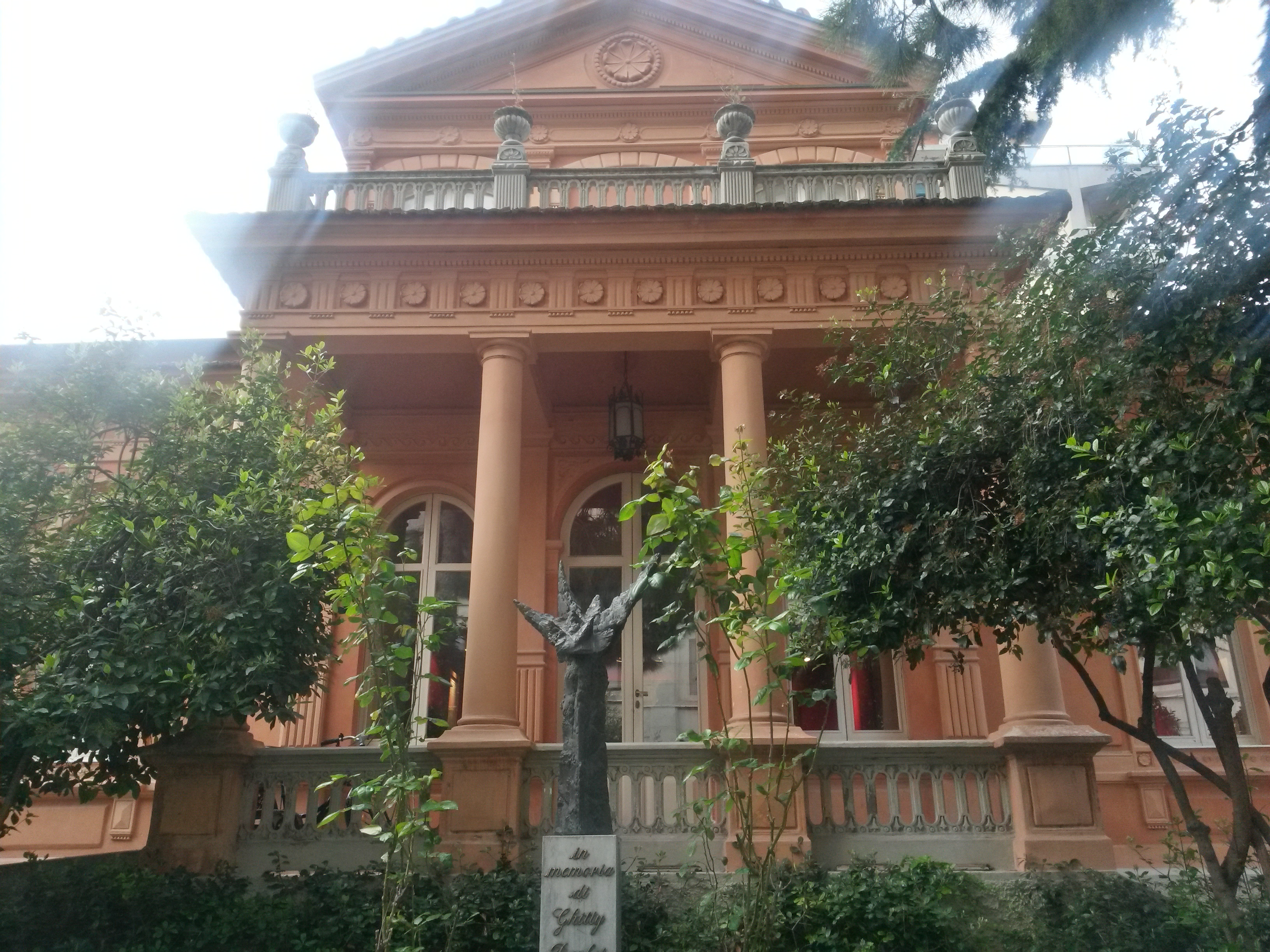 Facciata principale Villa Urania, sede della Fondazione Museo Raffaele Paparella Treccia e Margherita Devlet ONLUS, Pescara